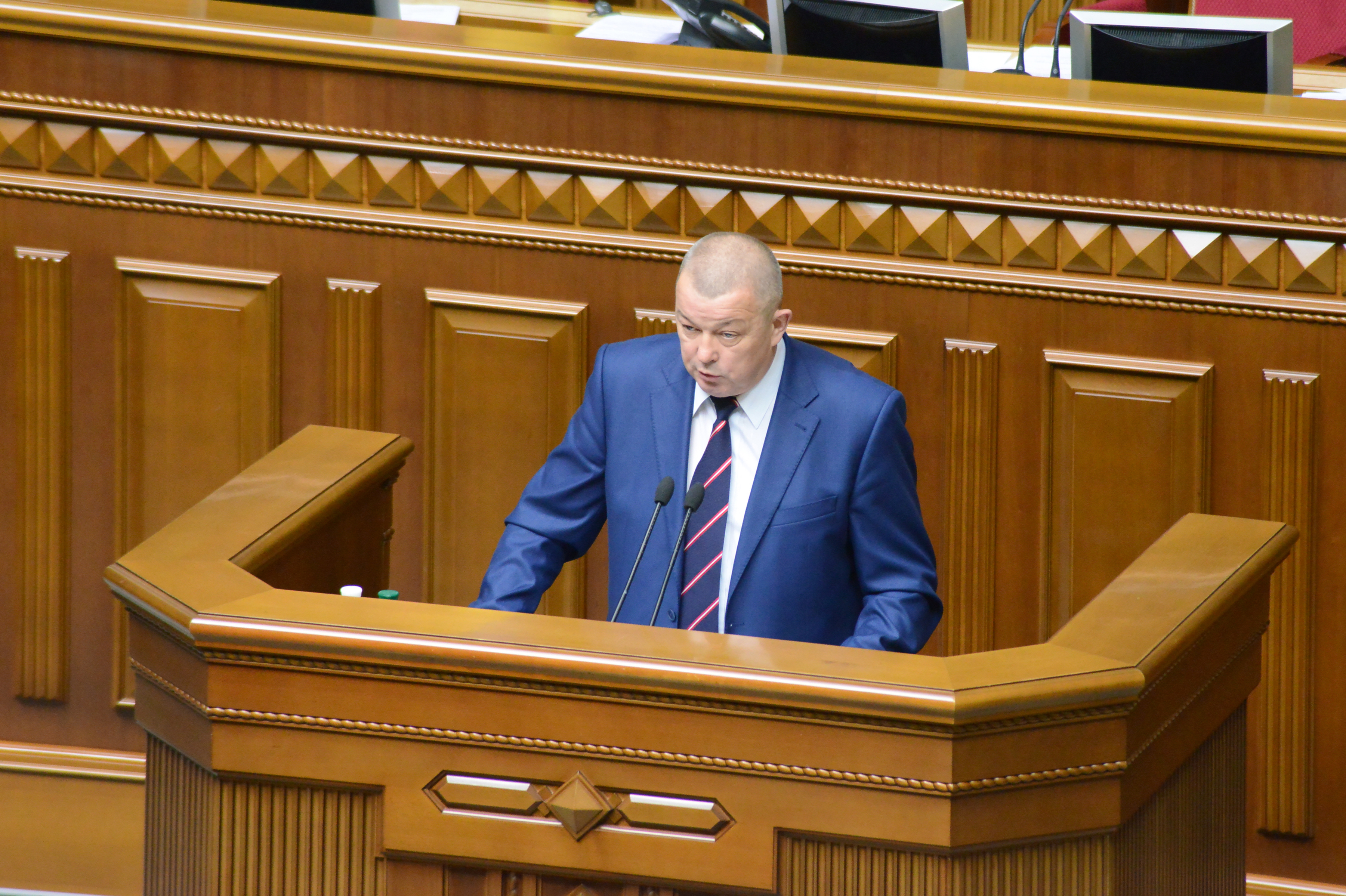 ВЕРХОВНА РАДА УКРАЇНИ 2015 фотограф Вадим Чуприна